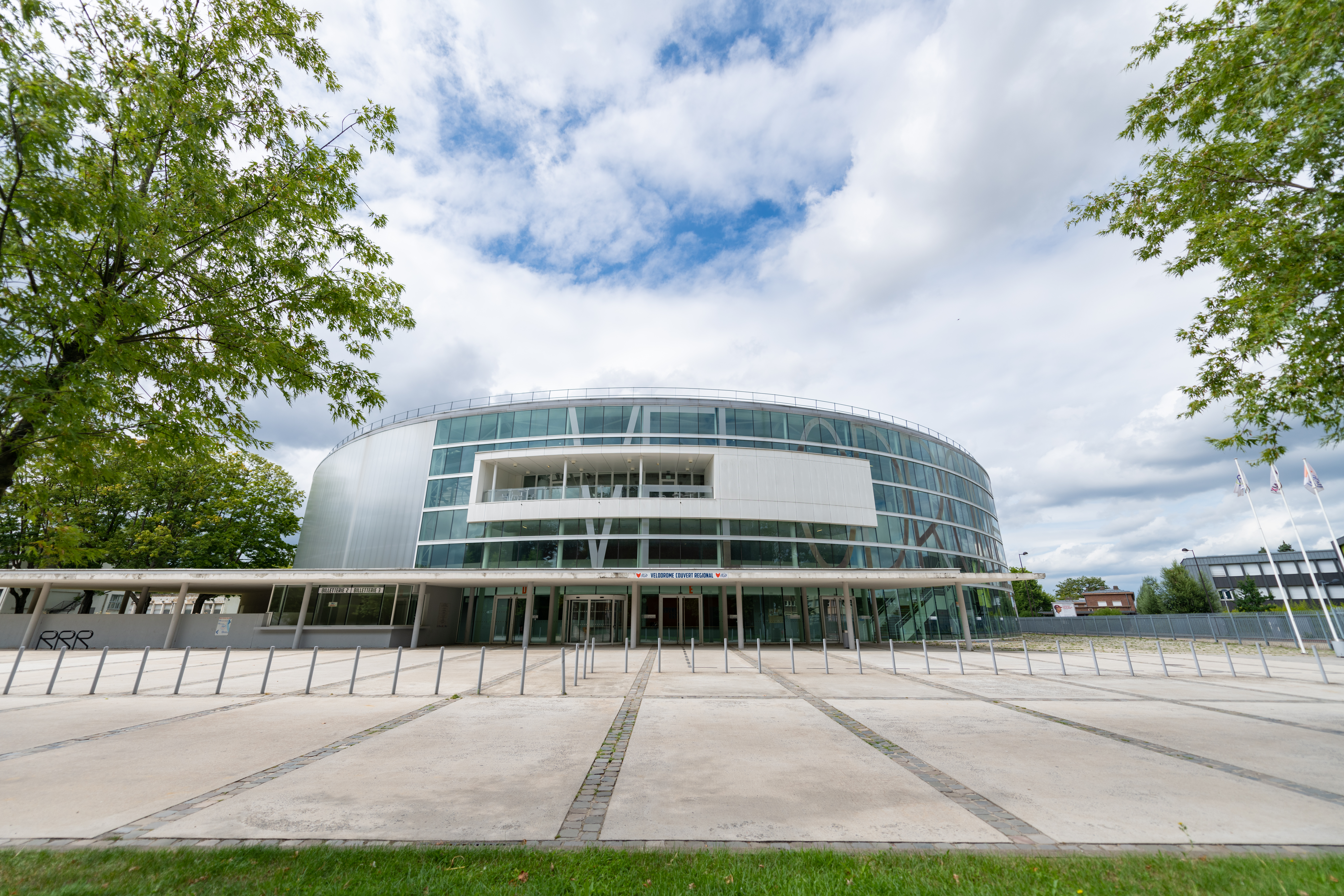 Le Stab Velodrome couvert dans le quartier de la Justice.